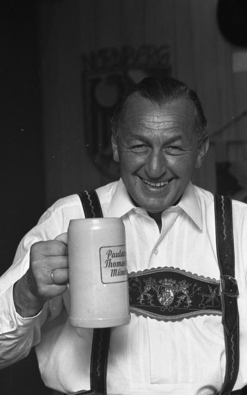 Zitherspieler Alfons Schmidseder in der Landesvertretung Bayern Bonn